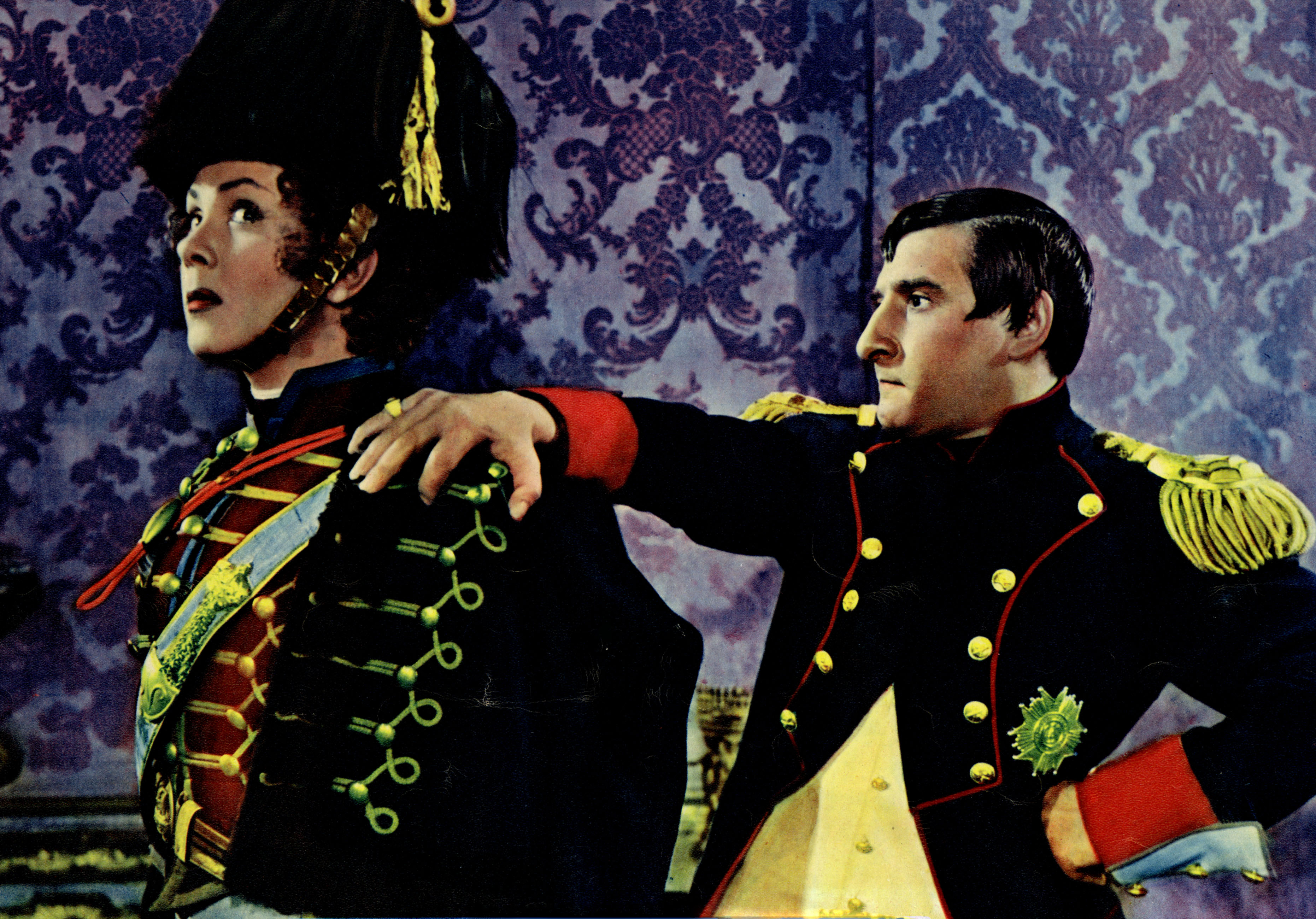 Napoleone